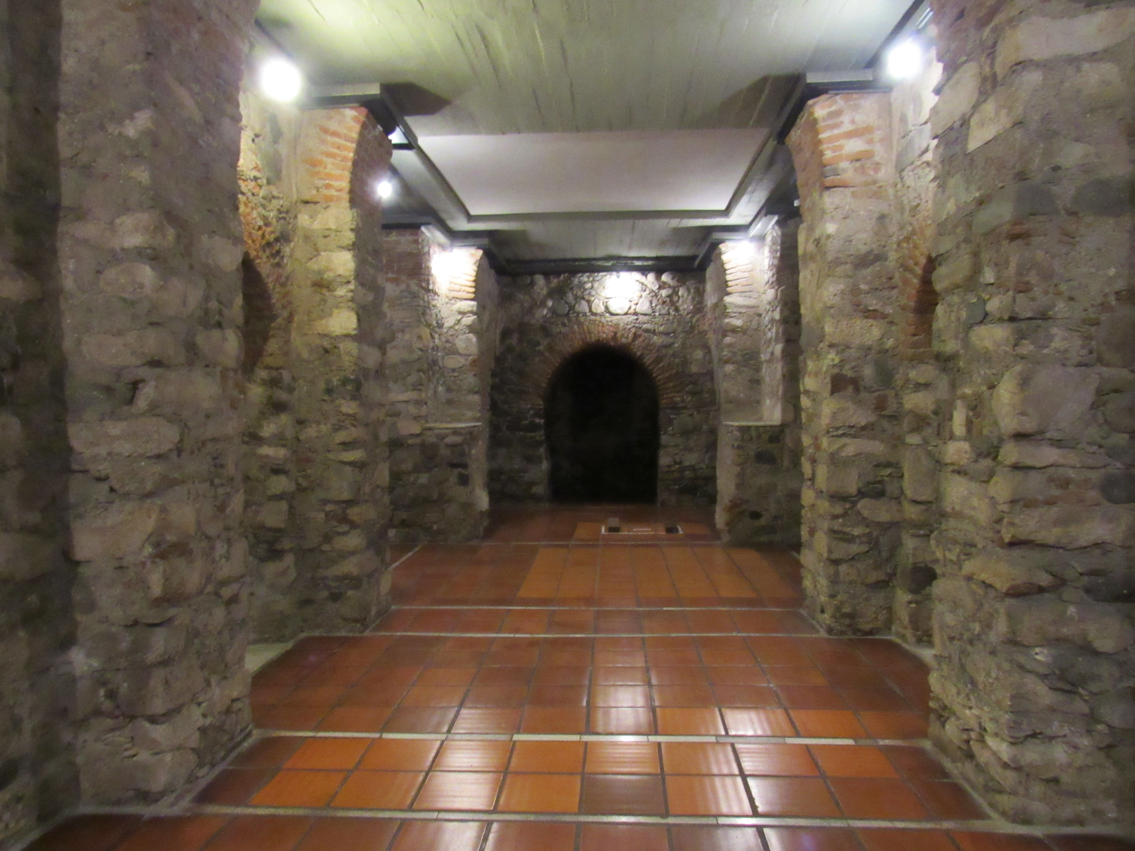 La Cripta Jesuítica es la ruina soterrada de lo que alguna vez fue el Noviciado Jesuítico de Córdoba, Argentina. Recuperada en 1989 como museo.